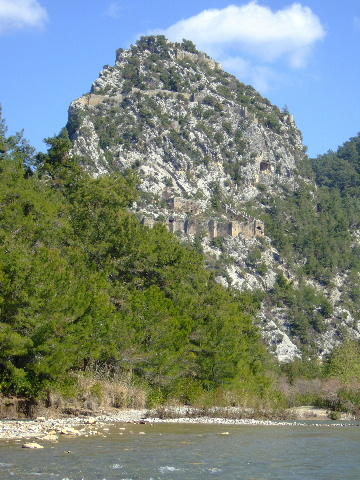 Alara Fluss und Burg (trk. Kalesi)